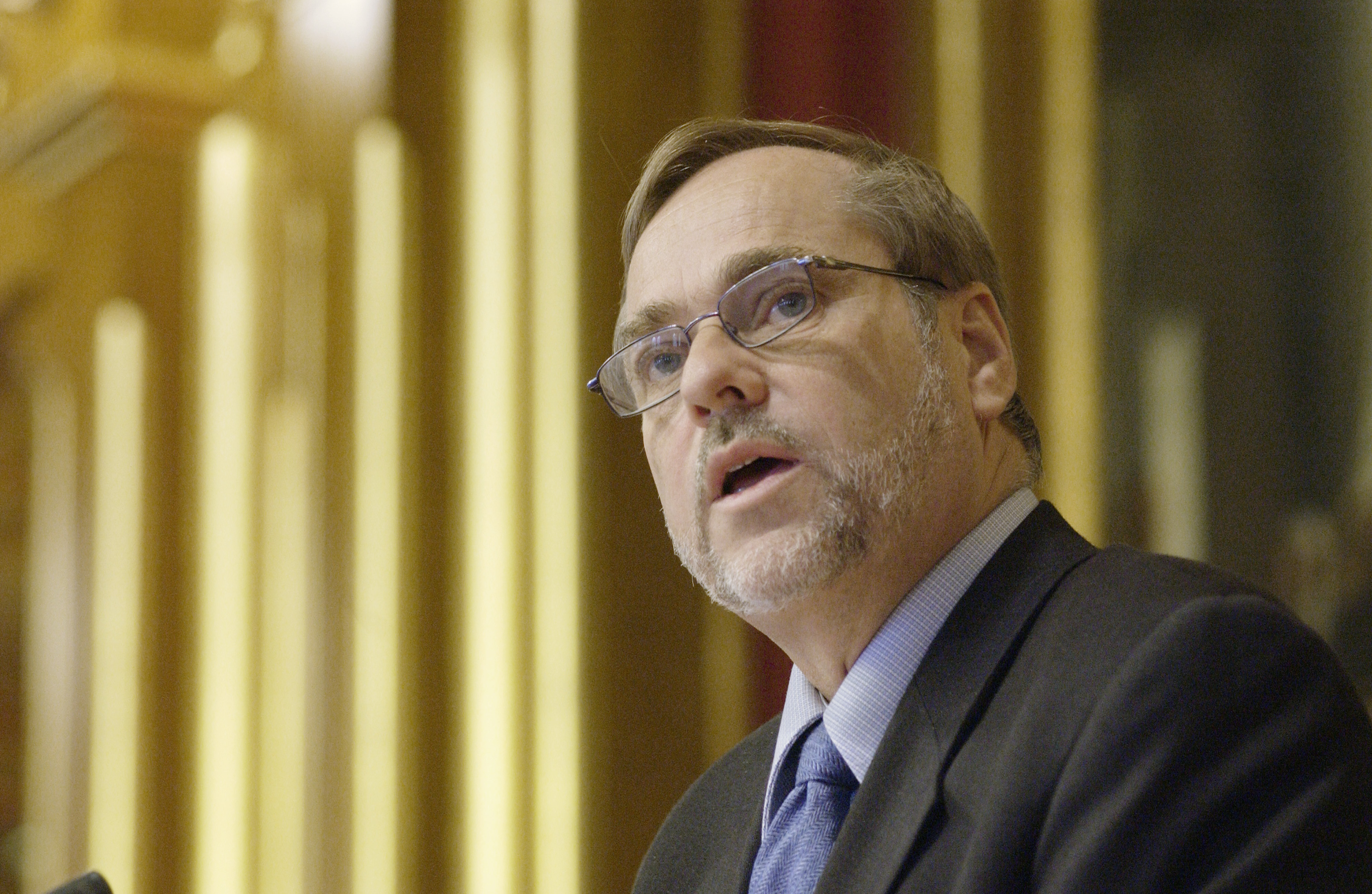 Jan Petersen, utrikesminister Norge (Bilden är tagen vid Nordiska rådets session i Oslo, 2003)